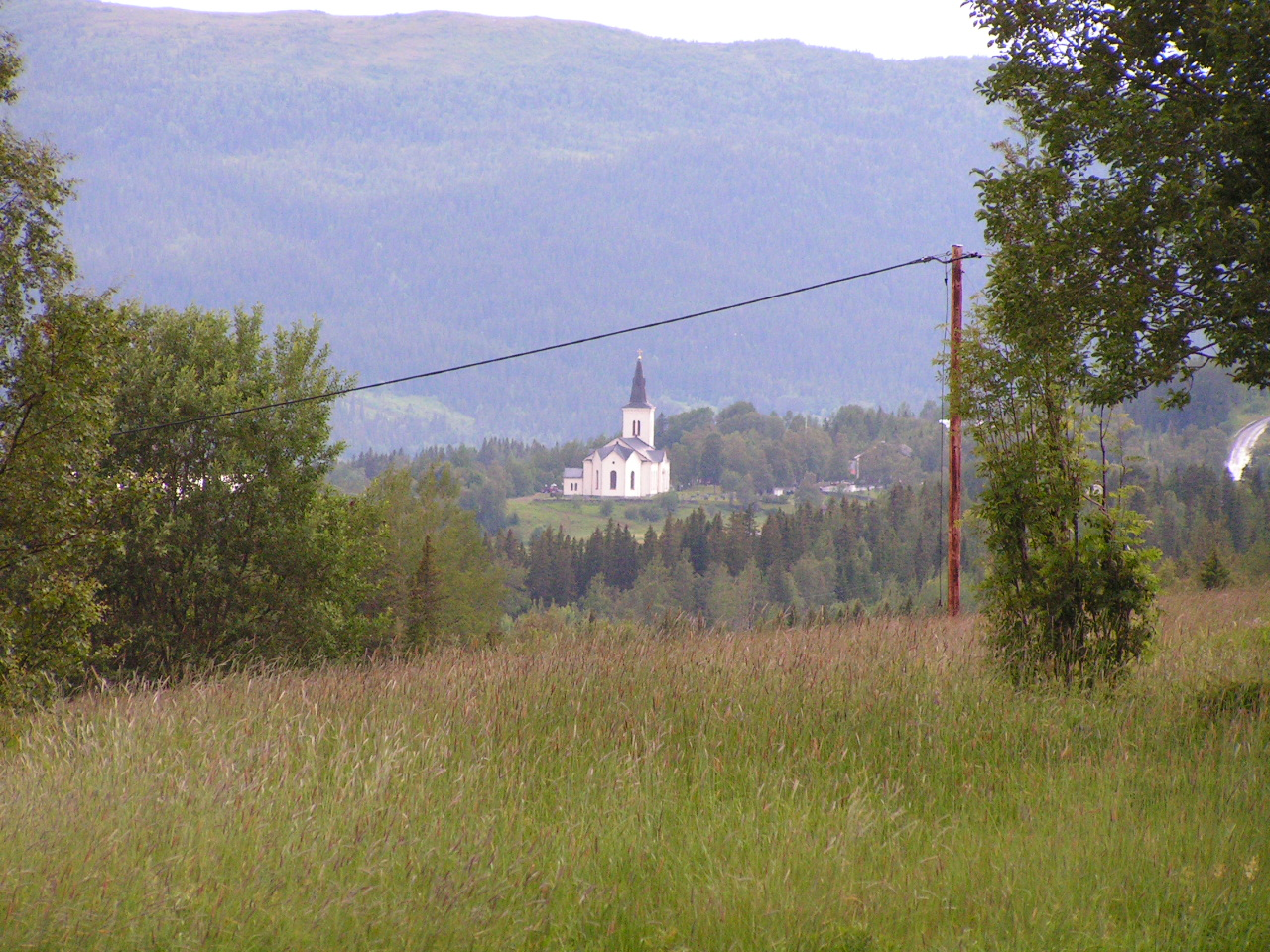 Kall kyrka från Sölvsved